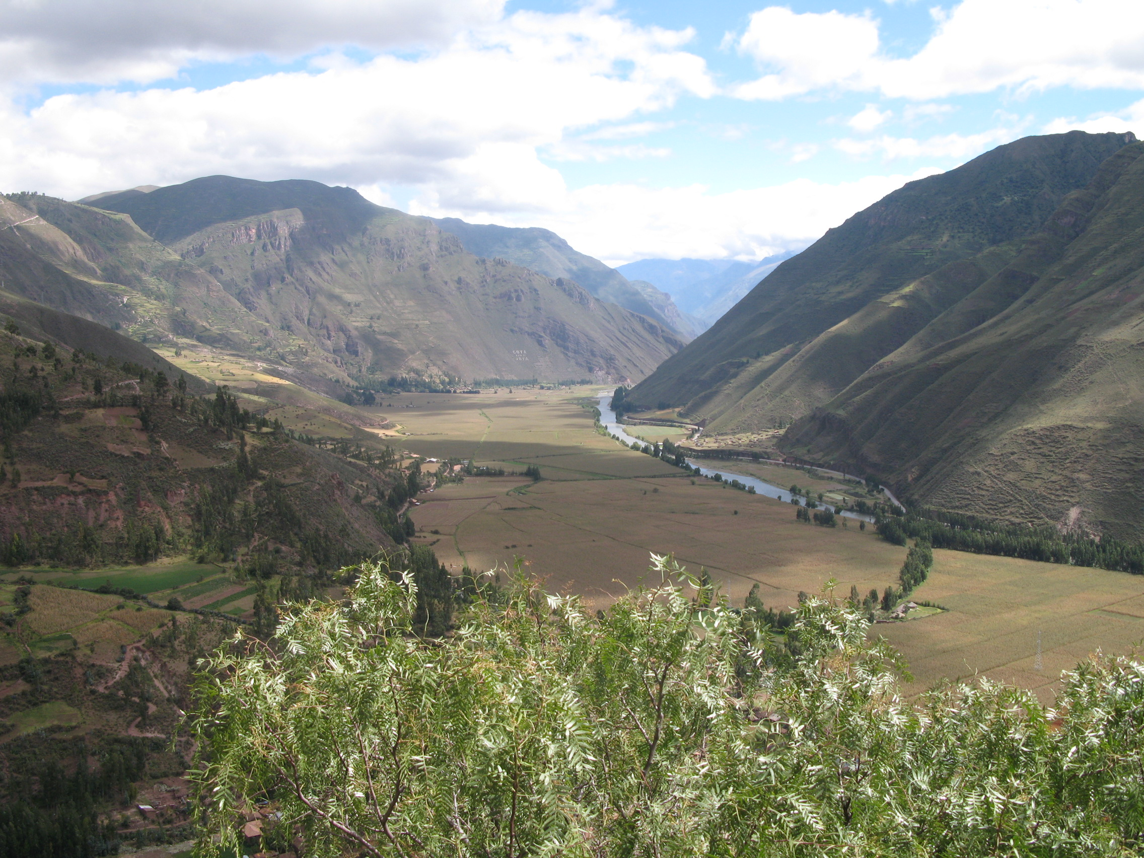 Med Cuzcom in Ollantaytambom teče reka Urubamba po Sveti dolini Inkov